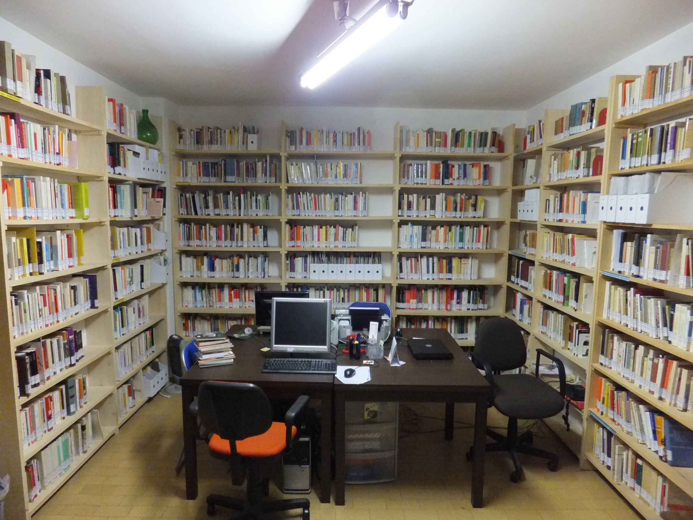 Sala consultazione e lettura